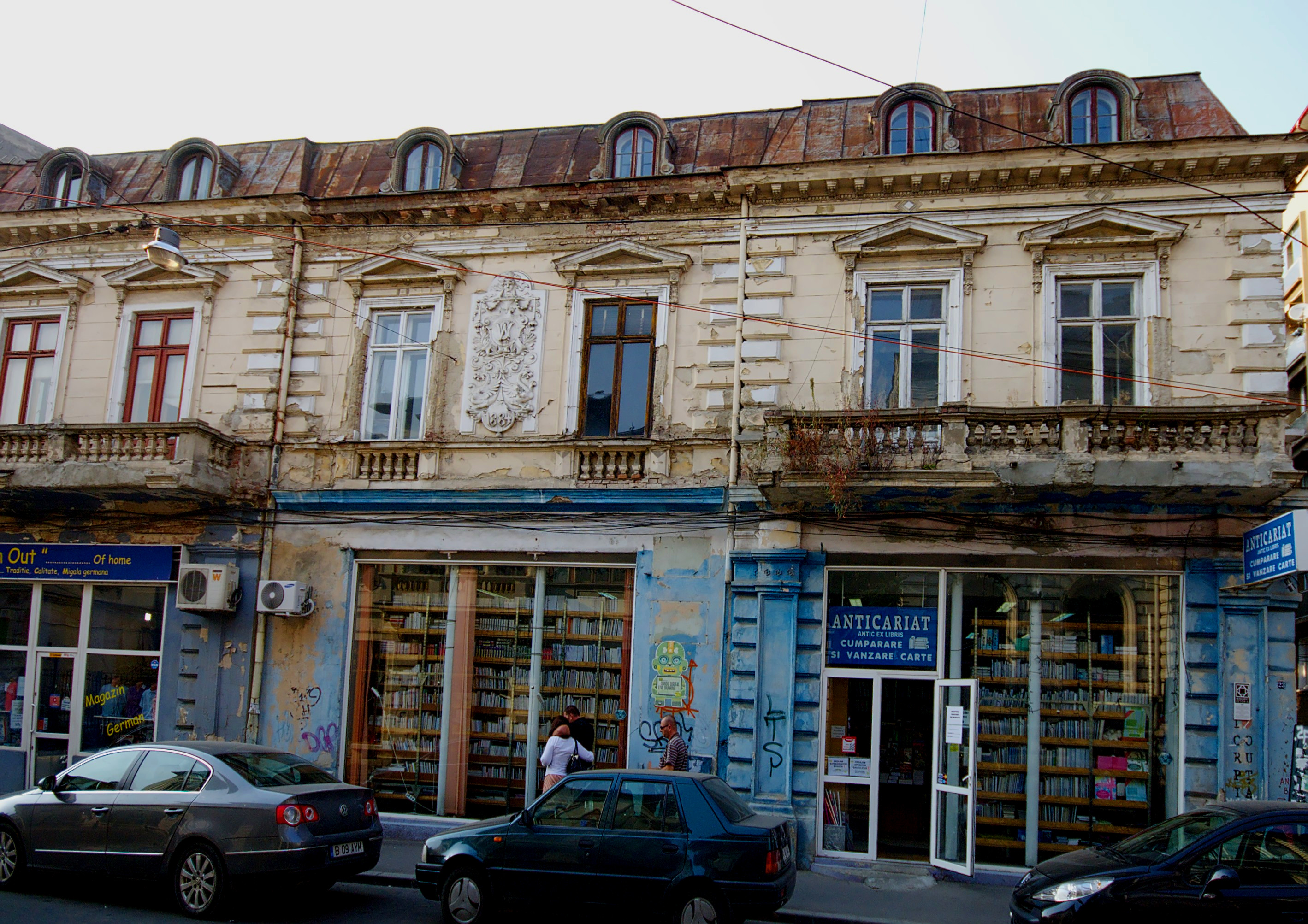 Casă, Doamnei 23